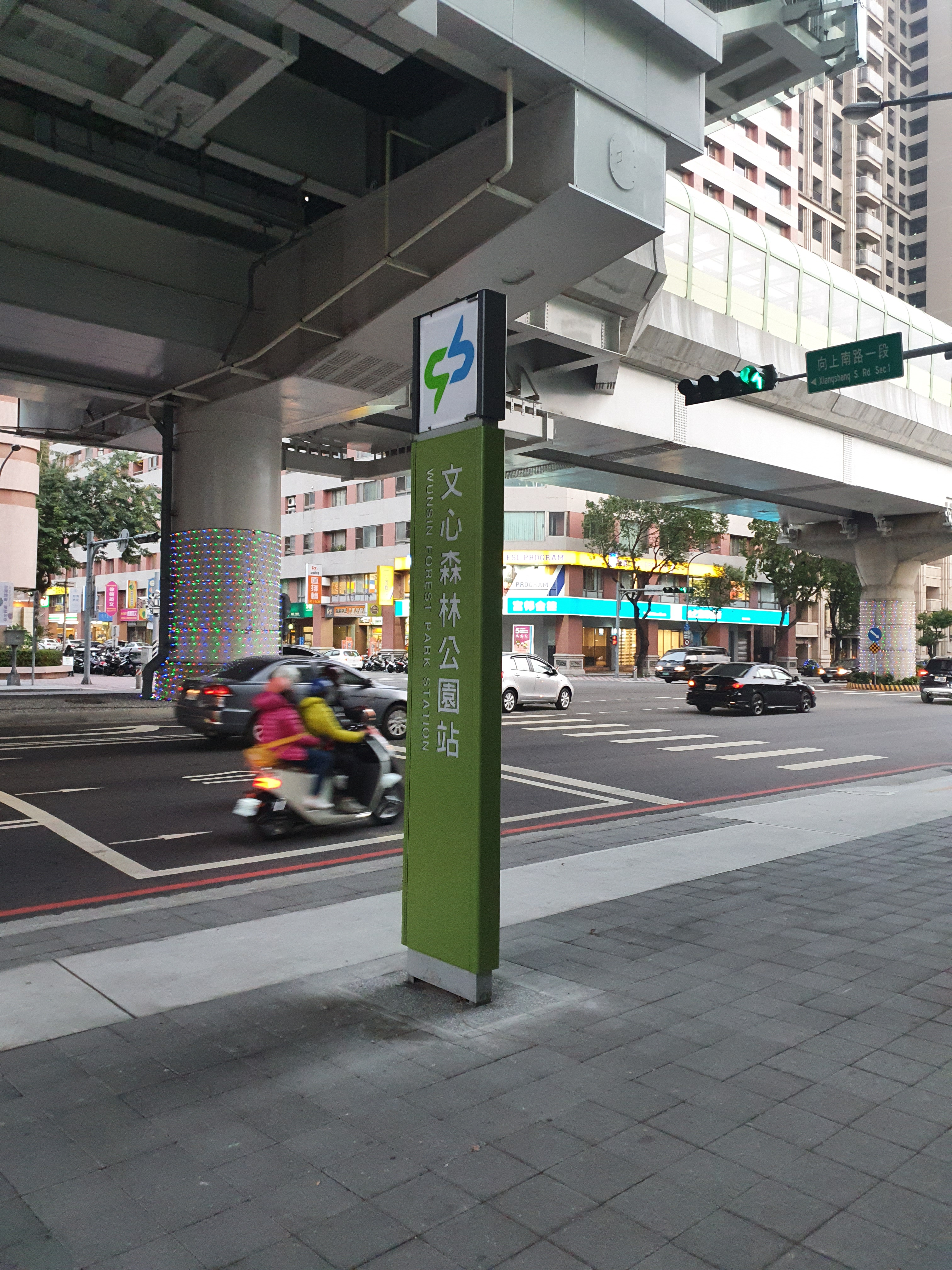 臺中捷運文心森林公園站牌